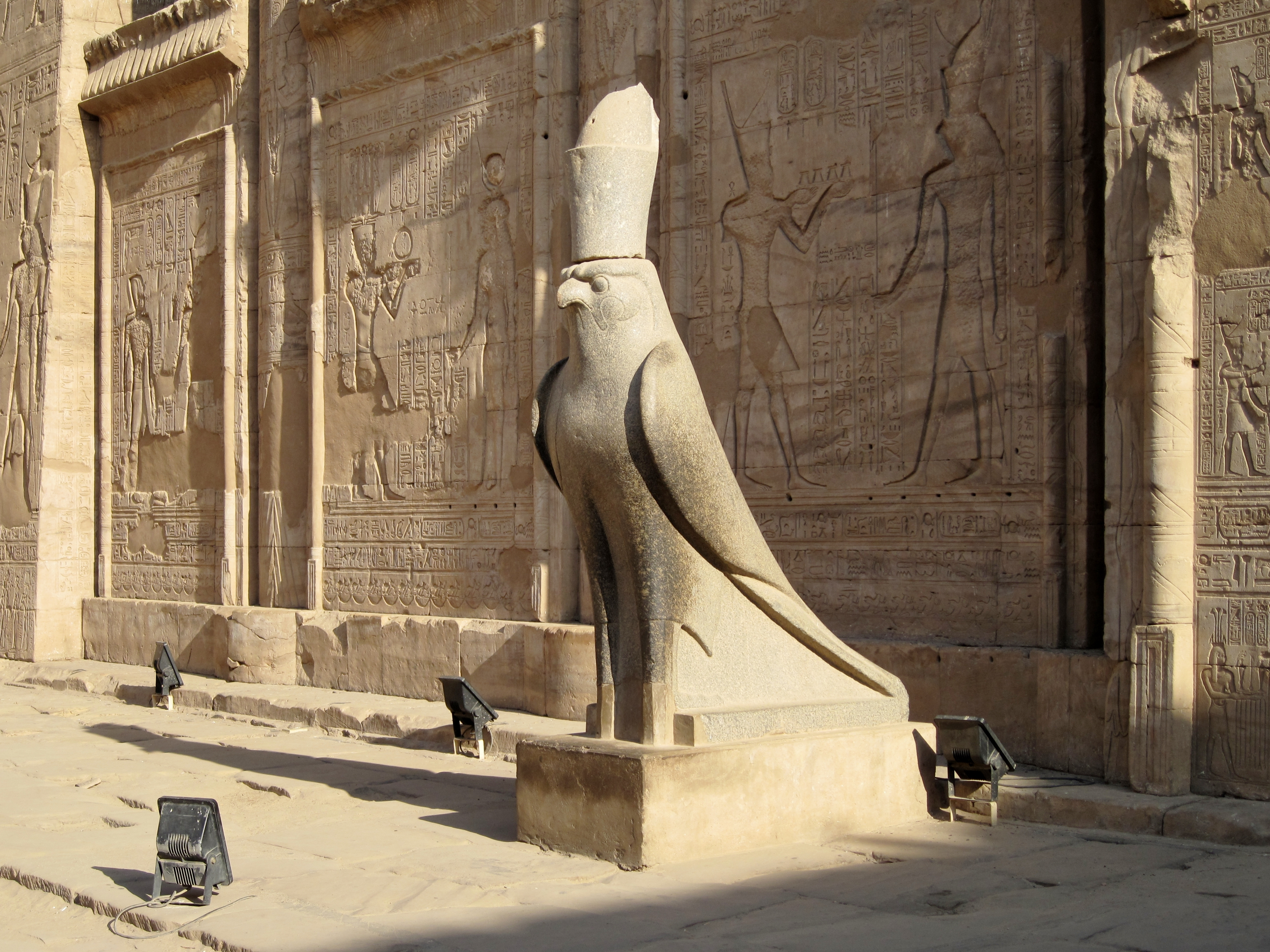 Statue des Hor-Behdeti („Horus von Edfu“) im Innenhof des Tempels von Edfu, Ägypten